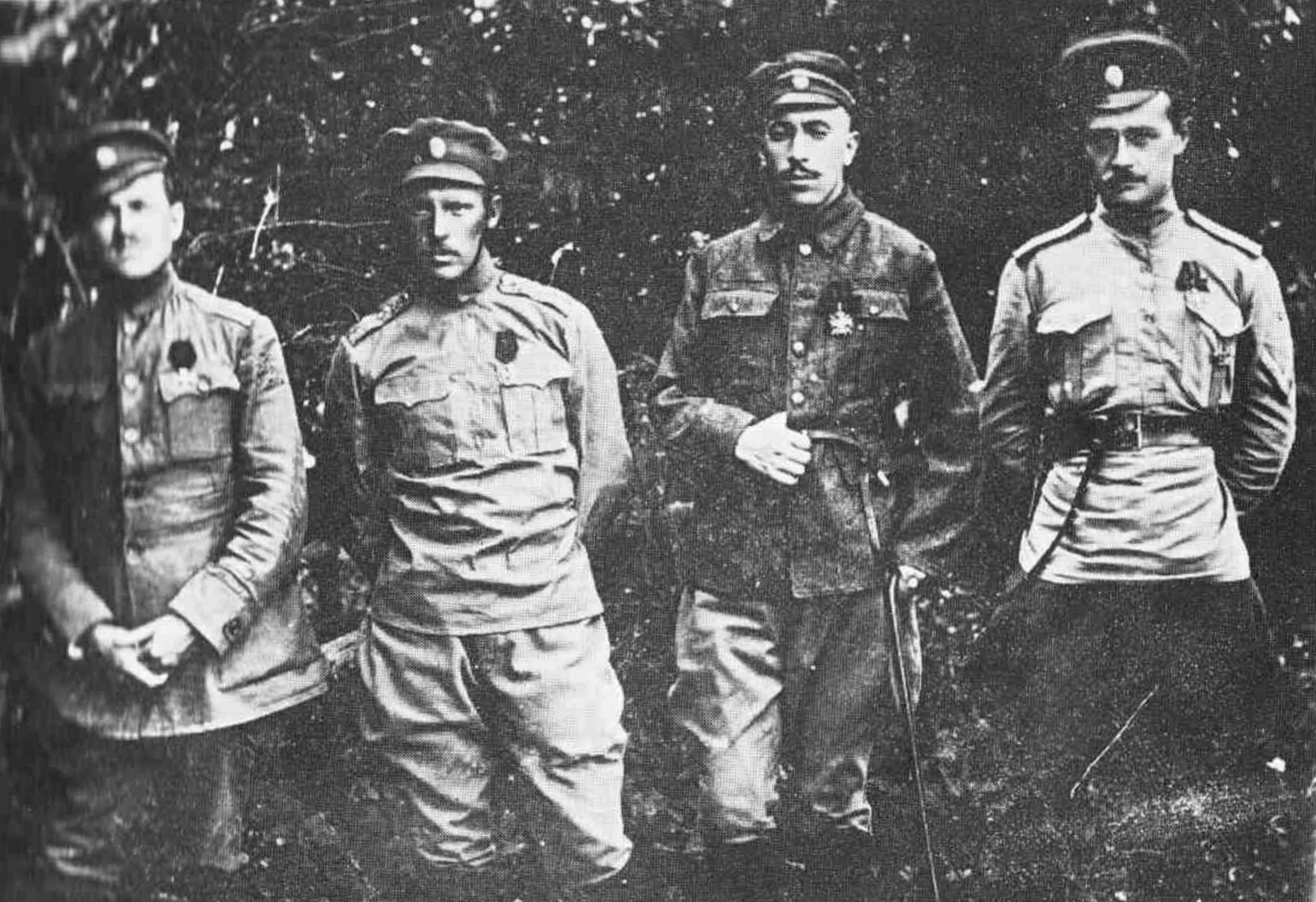 Слева направо: генерал-майор Чеснаков, полковник Косицкий, полковник Думбадзе и полковник Гулевич. В книге Кравченко «Дроздовцы от Ясс до Галлиполи» (Мюнхен, 1975) перечислены в неправильном (обратном) порядке, правильный порядок — в книге Туркула «Дроздовцы в огне» (Белград, 1937).